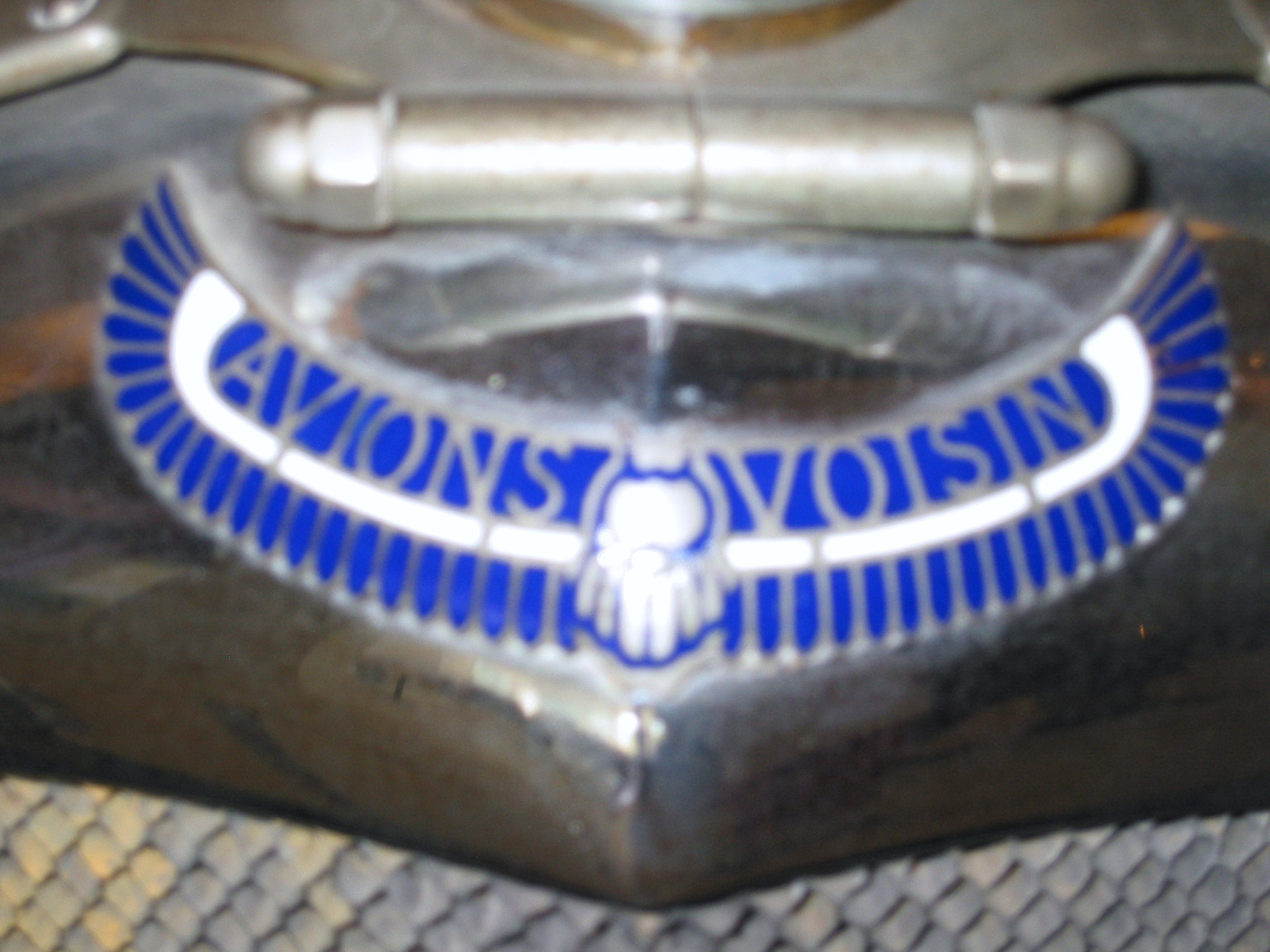 Emblem Voisin